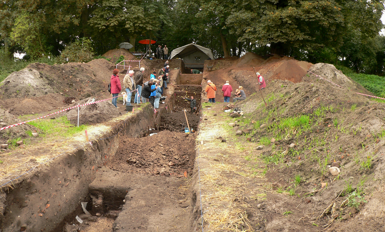 Ausgrabung Burg Wölpe 2013. Der Grabungsschnitt reicht weit in die Niederung rein mit der Absicht, den Burggraben zu finden.